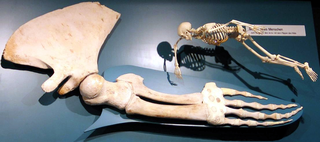 Flipper eines Finnwales im Zoologischen Museum in Hamburg, fotografiert im September 2004 von soebe. Titel: Flipper eines Finnwals Foto: soebe, 25.09.2004 (Original text: Das Foto habe ich im Zoologischen Museum in Hamburg aufgenommen. Zur Schonung der Exponate ist das Licht in den Ausstellungsräumen gedämpft. Bei der Verwendung des Blitzlichtes werden die hellen Knochen oft überstrahlt. Daher habe ich mich in diesem Fall für eine Aufnahme mit längerer Belichtungszeit und Stativ entschieden. Das menschliche Skelett dient zum Größenvergleich und in der Ausstellung zum Vergleich zwischen dem Aufbau des menschlichen Armes und dem Aufbau der Walflosse.)